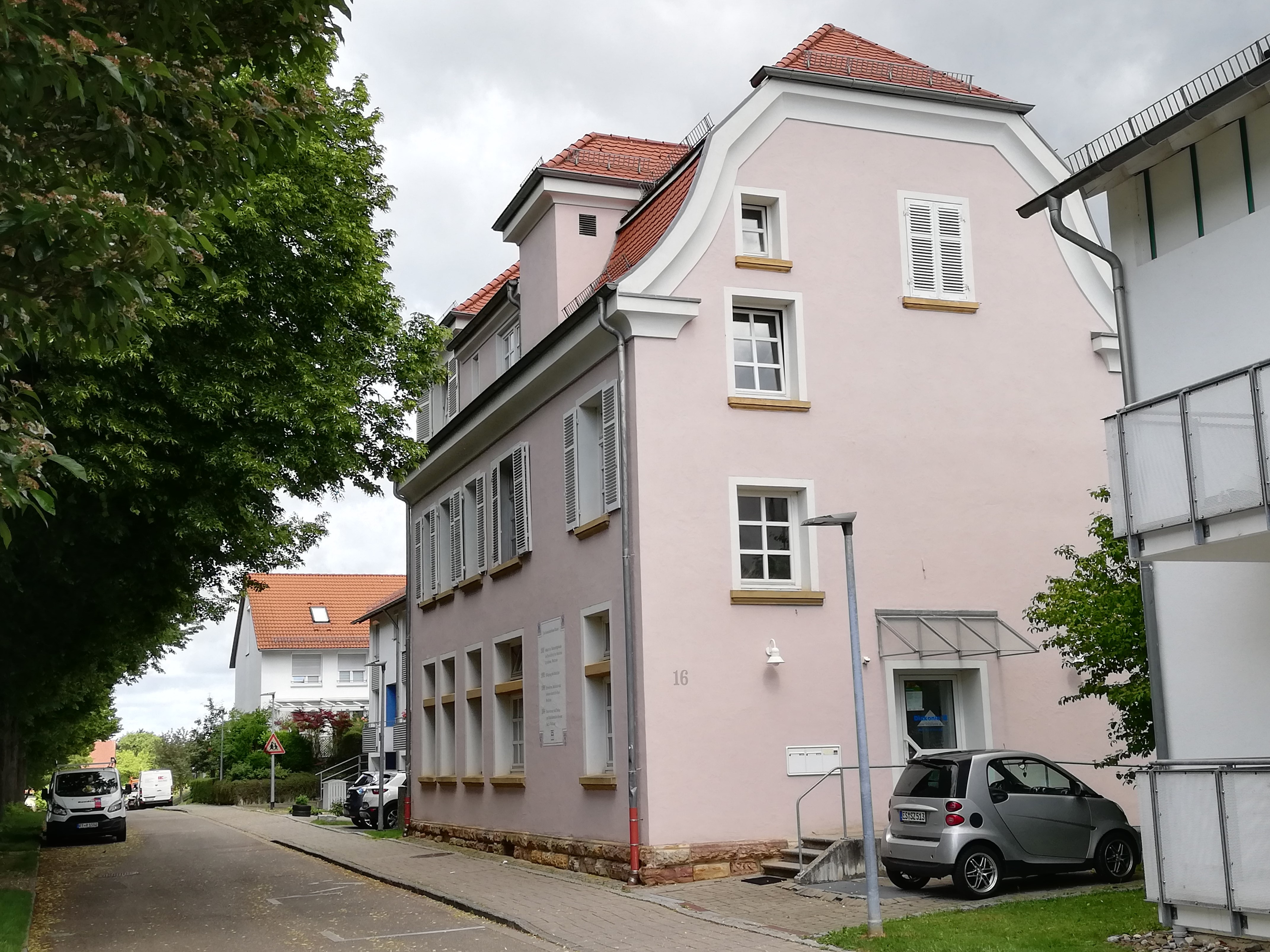 Ehemaliger Bahnhof Weilheim (Teck)